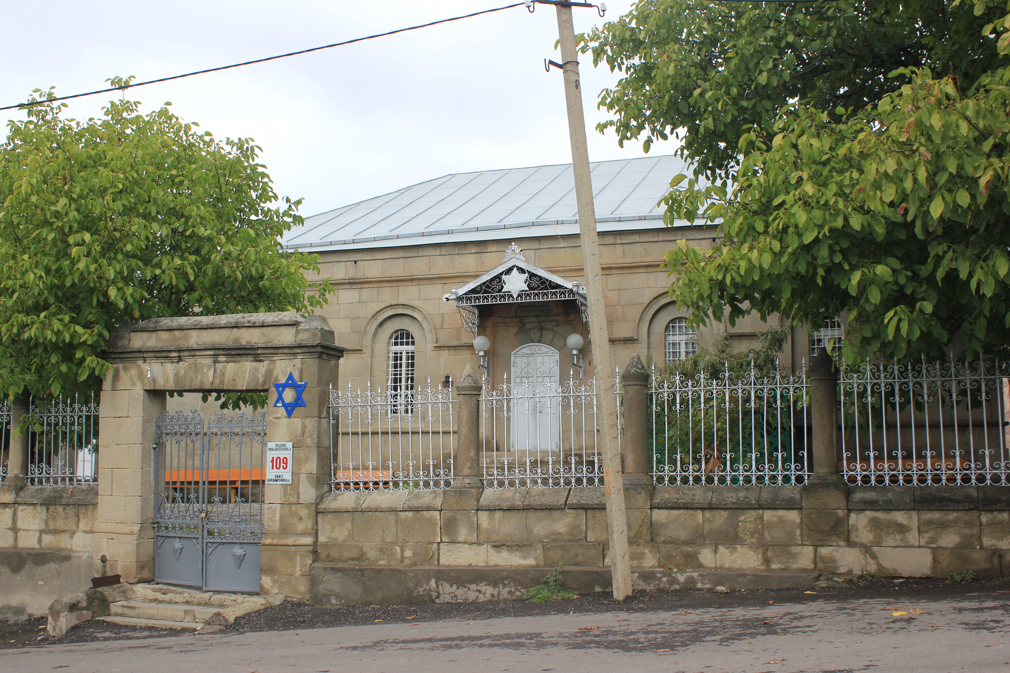 Die Alte Synagoge in Achalziche, Georgien. Hornjoserbsce: Stara synagoga w Achalciche, Georgiska.